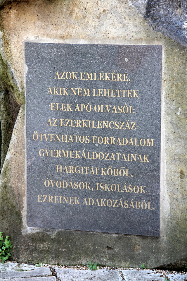 Elek Apó budai kútján tábla